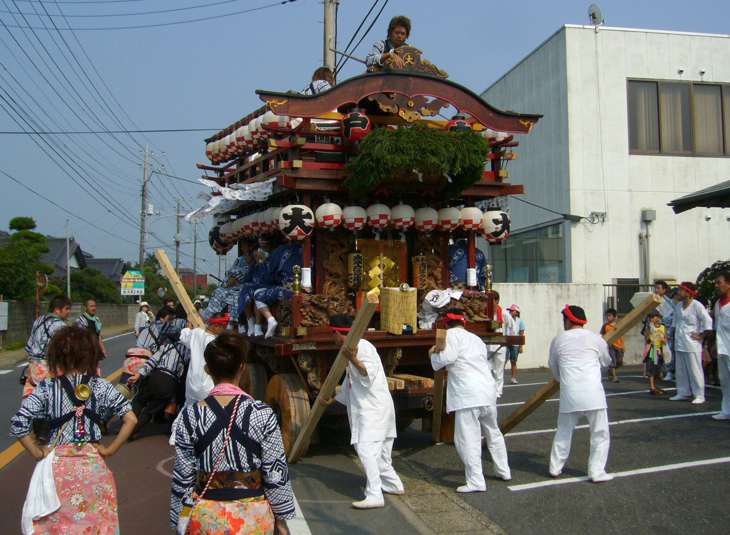 ookido,sasagawa-suwa-shrine-festival,tonosyo-town,chiba,japan.